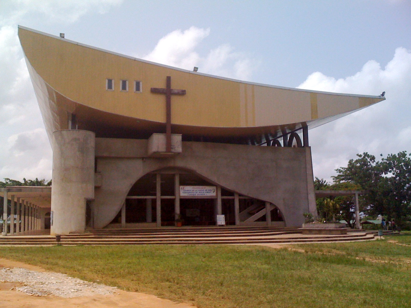 Paroisse catholique Saint-Laurent de Yopougon, Côte d'Ivoire